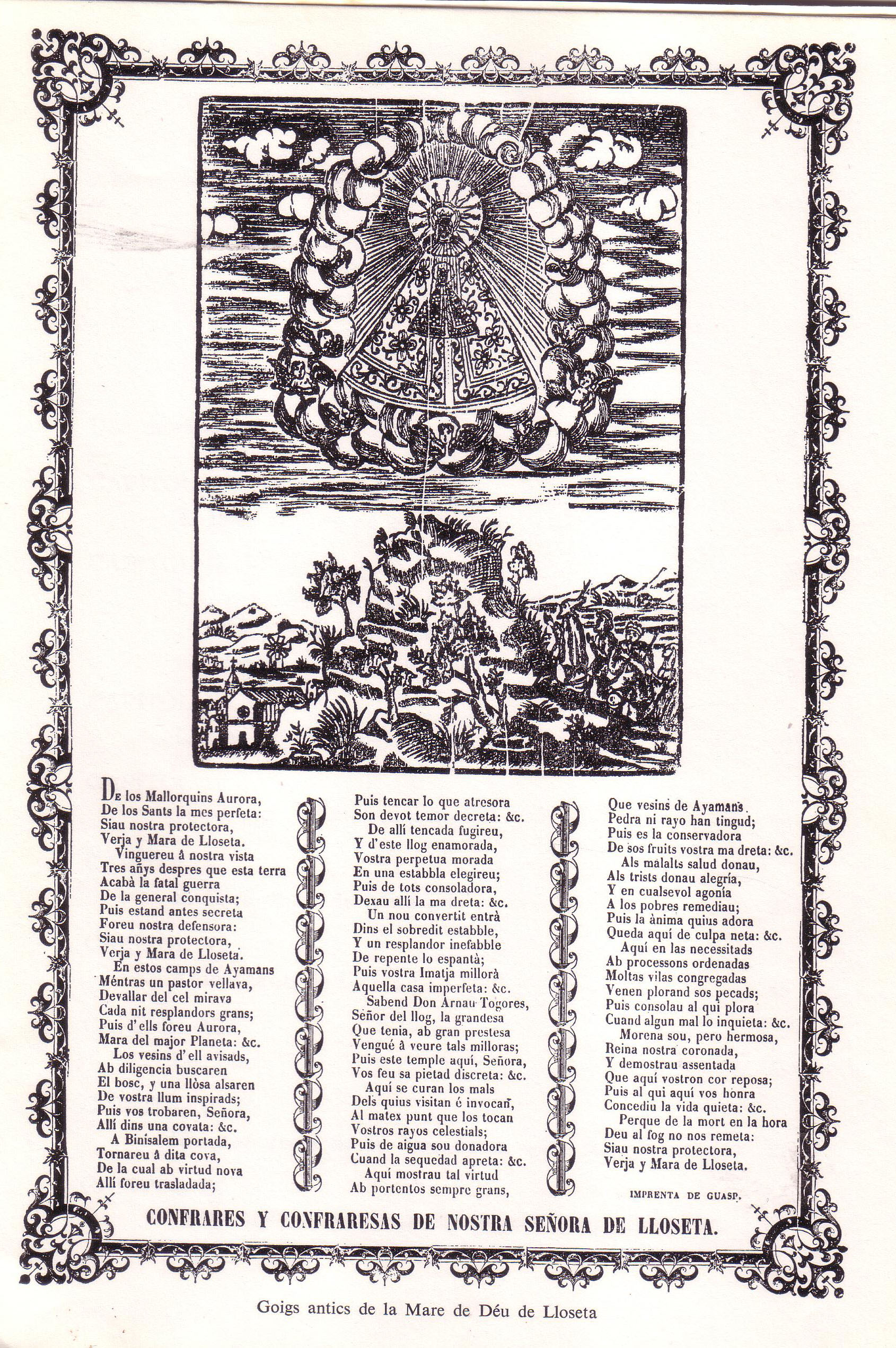 Goigs en honor de la Mare de Déu de Lloseta